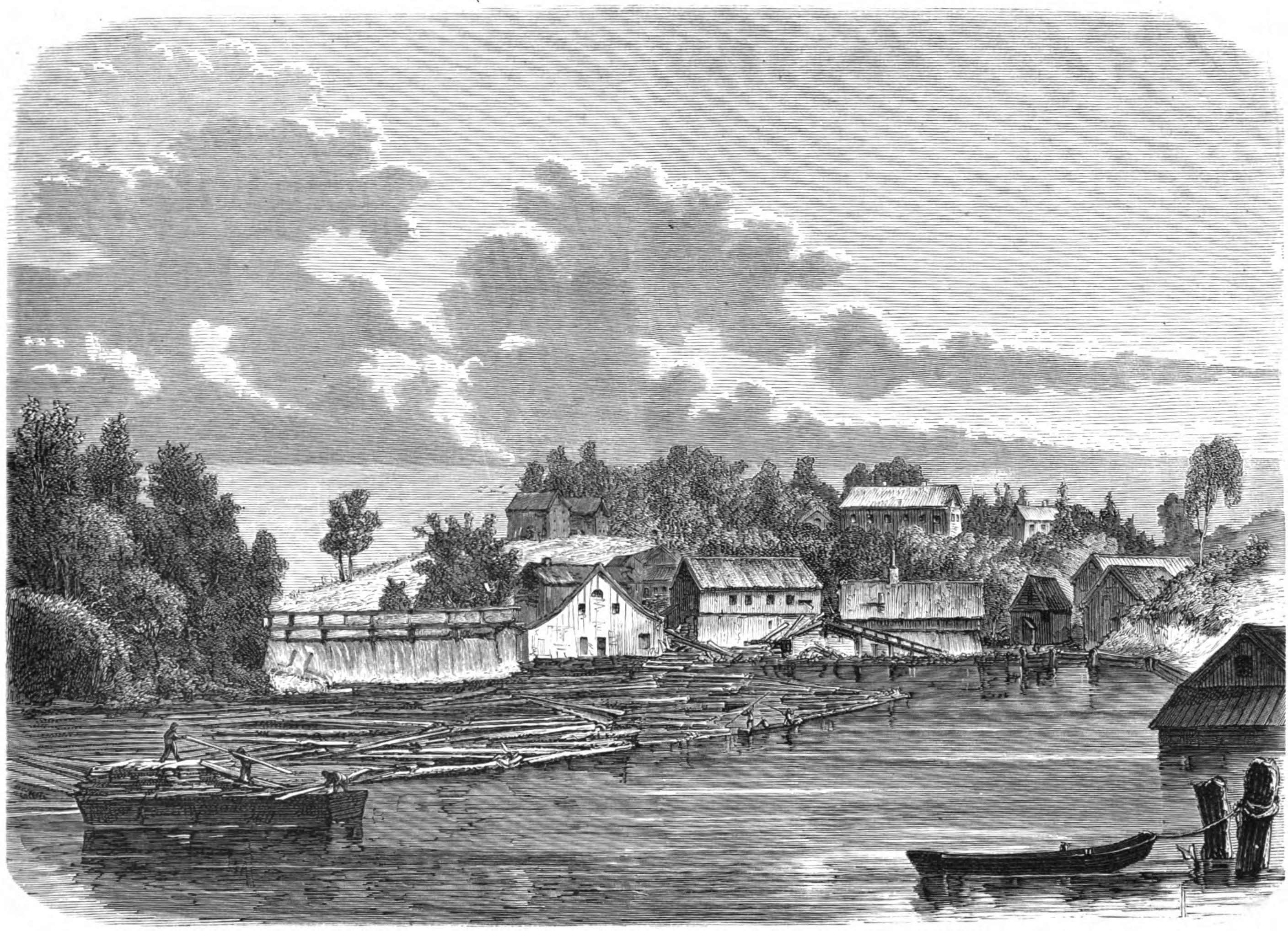 Töcksfors bruk vid Dalslands kanal i Värmland.